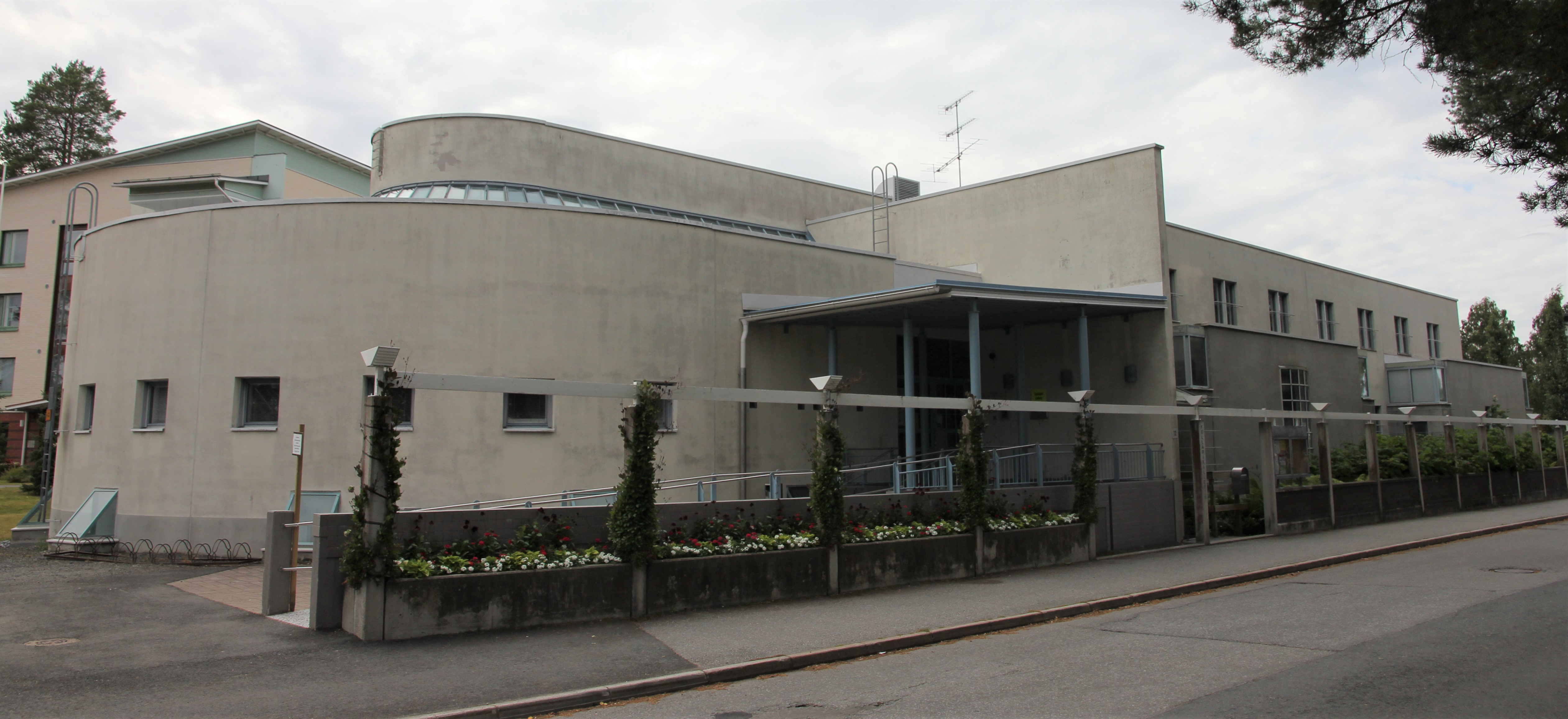 Suonenjoen kirjaston ja Kellarigallerian rakennus Suonenjoen keskustassa. Osoite: Olavi Leskisen katu 12, Suonenjoki.